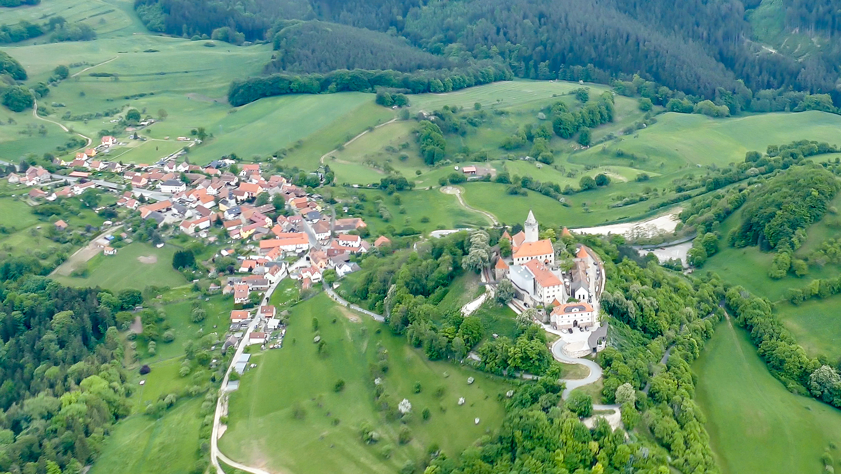 Leuchtenburg bei Kahla